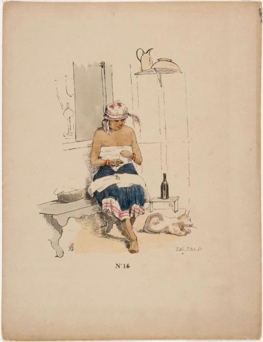 Litho. Ingekleurde litho door Petit naar een tekening van Théodore Bray (no. 14/25). Lichtgekleurde huisslavin op een plantage die bezig is met naaiwerk. Tijdens de slavernij bestonden er drie soorten slaven: plantageslaven, die op het veld moesten werken, huisslaven die huishoudelijke taken moesten verrichten, en dan nog eliteslaven, die een voorkeurspositie hadden verworven t.o.v. anderen. Vaak waren zij degene die de slaven in bedwang moesten houden, of moesten straffen bij overtredingen. Dit systeem was handig voor de blanke overheerser, het verdeel-en-heers-systeem, waarbij onderdrukten elkaar beconcureerden voor betere posities en leefomstandigheden.. Ingekleurde litho voorstellende een plantageslavin